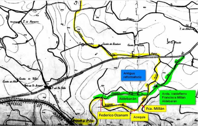 Plano de 1892 con trazados remarcados de calles actuales.